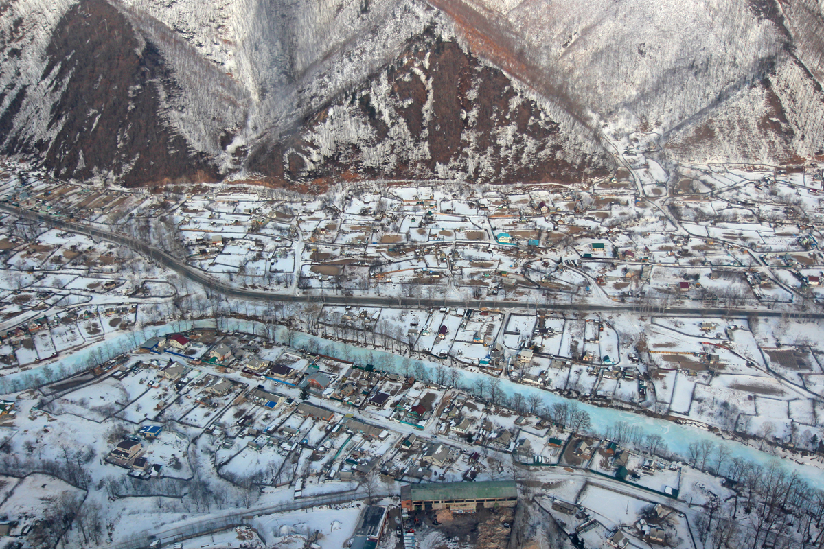 Вид на Дальнегорск при вылете с аэродрома